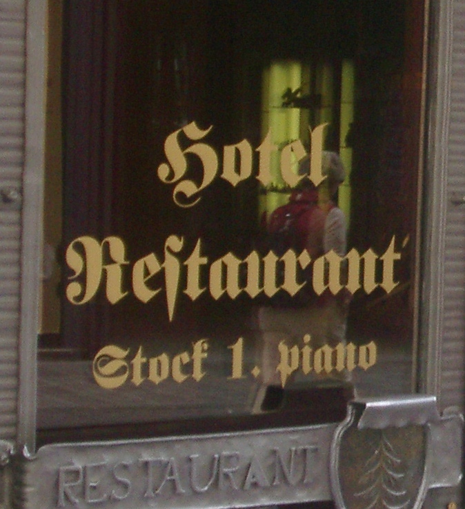 Bozener Restaurant mit Frakturschrift, Sommer 2003